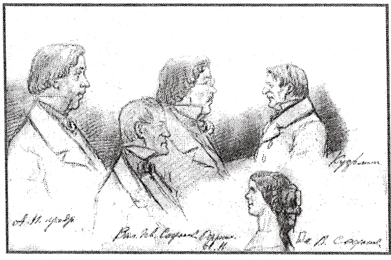 Рисунок из анонимного альбома 1850-х годов с изображением Орловского губернатора Сафоновича и членов его окружения